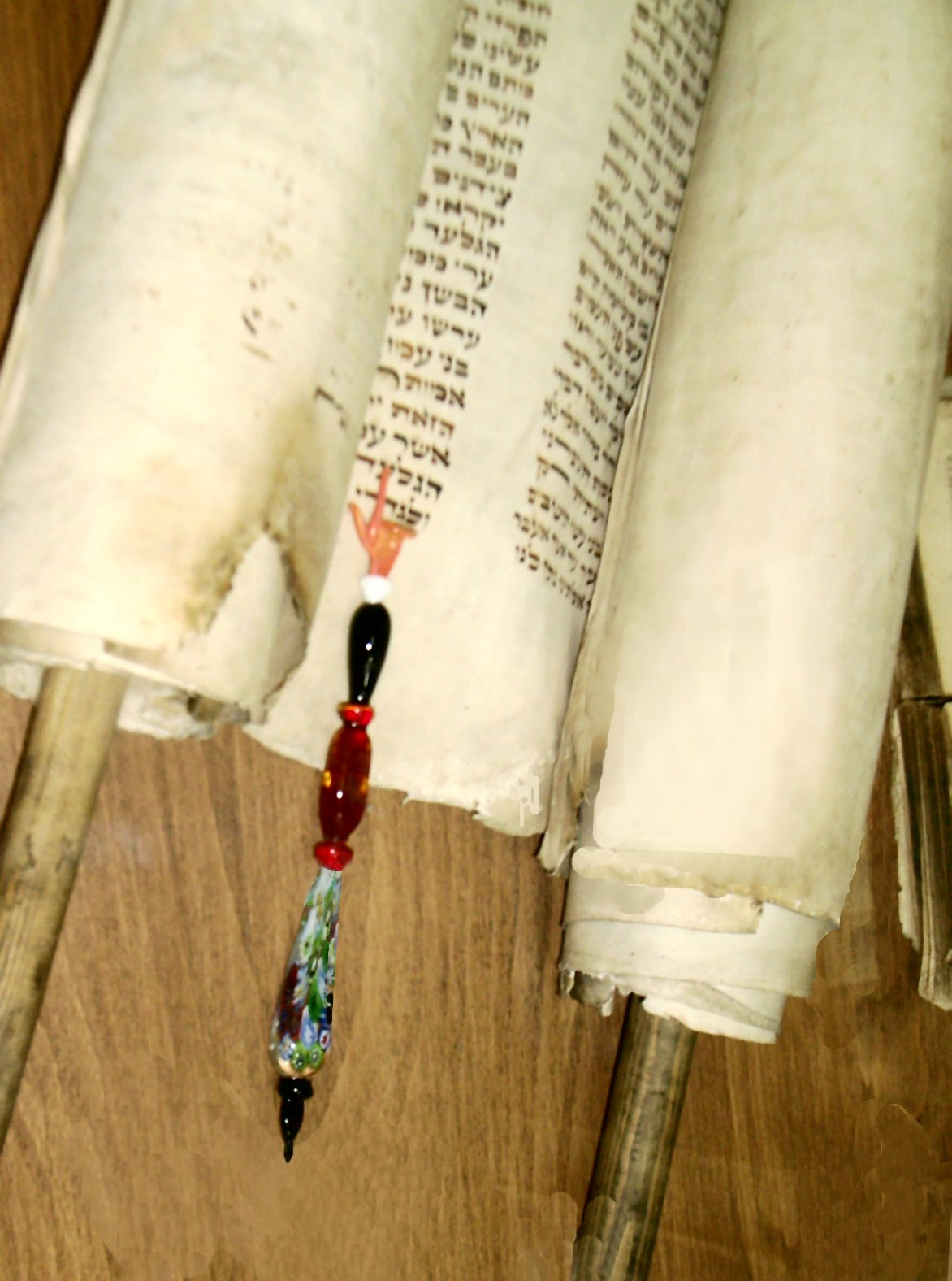 Jad (hebr)- wskaźnik w ksztalcie ręki